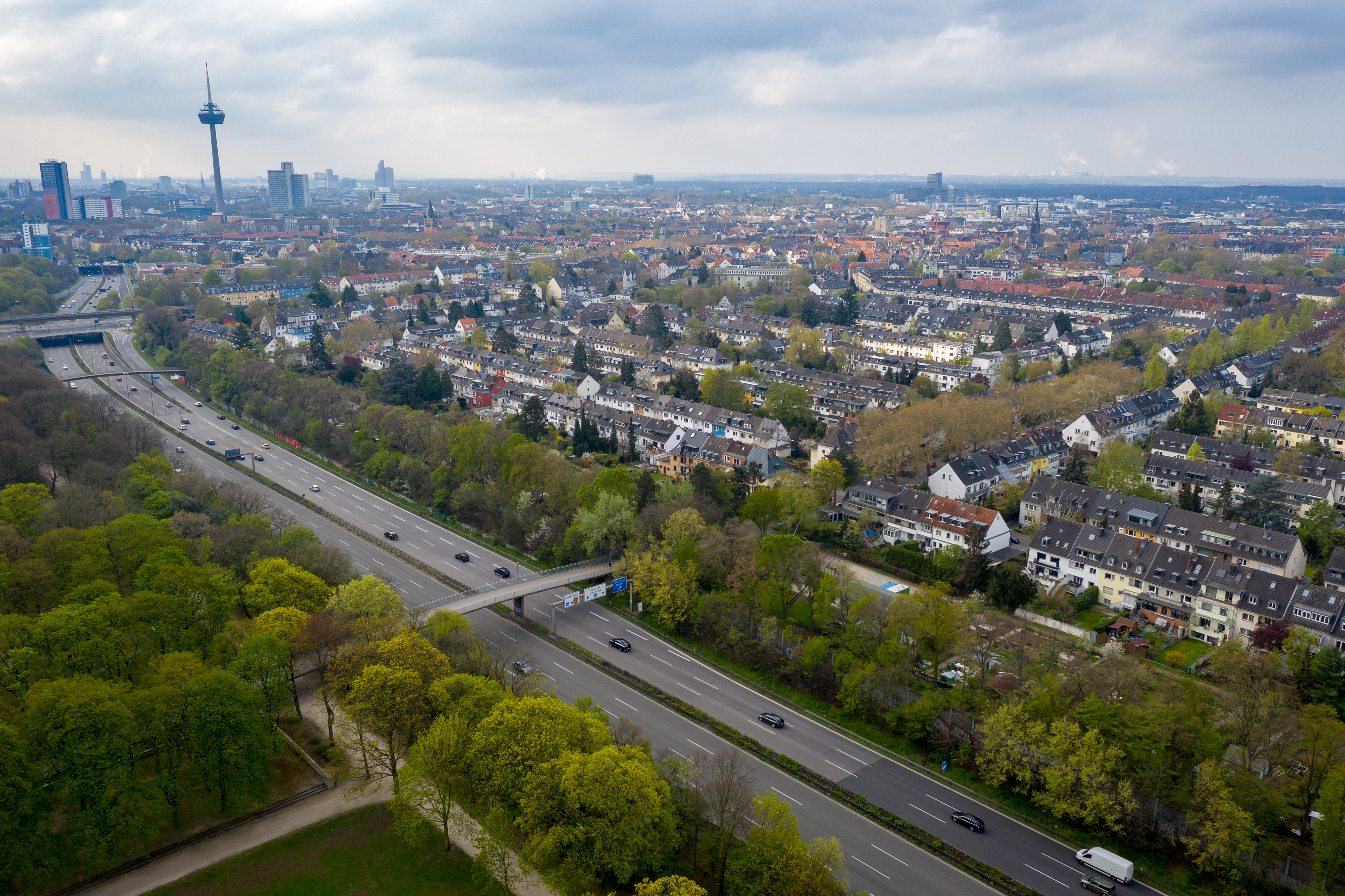 Luftaufnahme nordöstlicher Abschnitt des Blücherparks mit Blick auf die A57, Neuehrenfeld